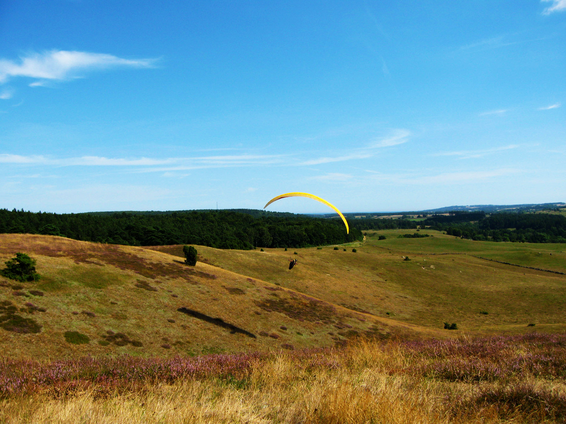 Skärmflygare i Brösarps norra backar.